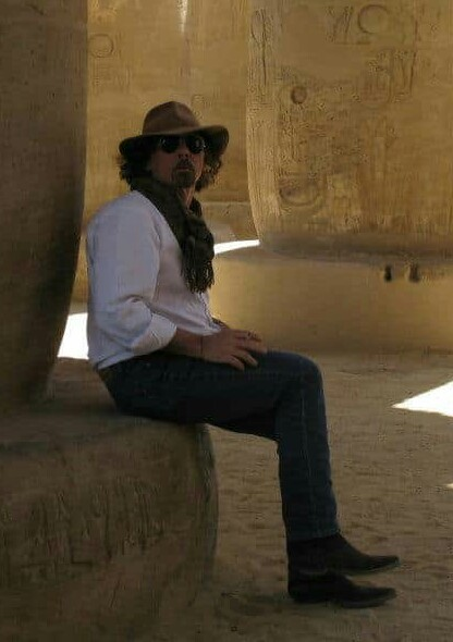 scrittore e egittologo italiano